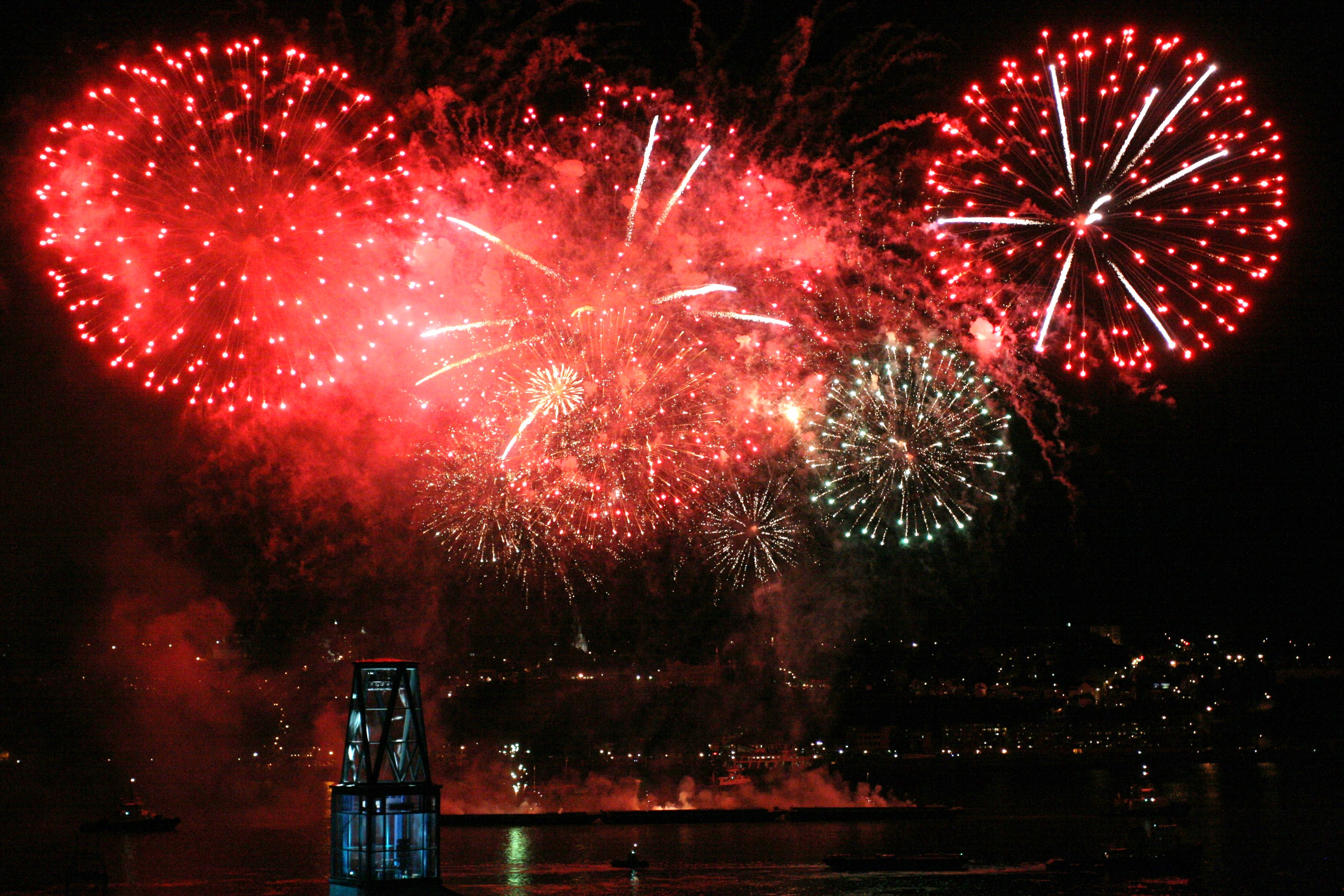 Feu d'artifice du 400e anniversaire de la Ville de Québec du 3 juillet 2008 près du vieux port de Québec sur le fleuve Saint-Laurent